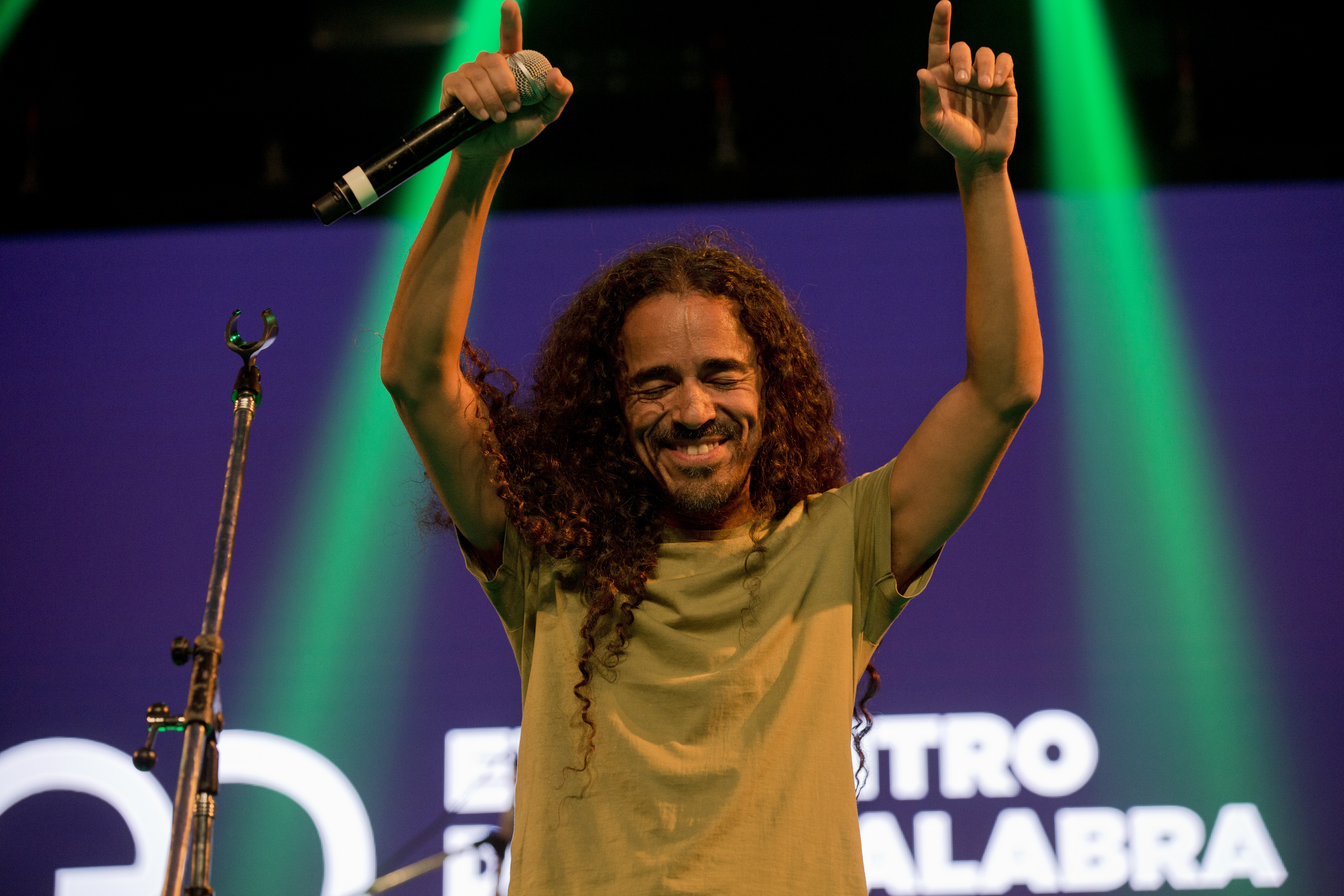 Villa Martelli, 22 de marzo de 2015.- Hoppo e Hilda Lizarazu se presentaron en el Ciclo Cruces, en el Encuentro de la Palabra en Tecnópolis.